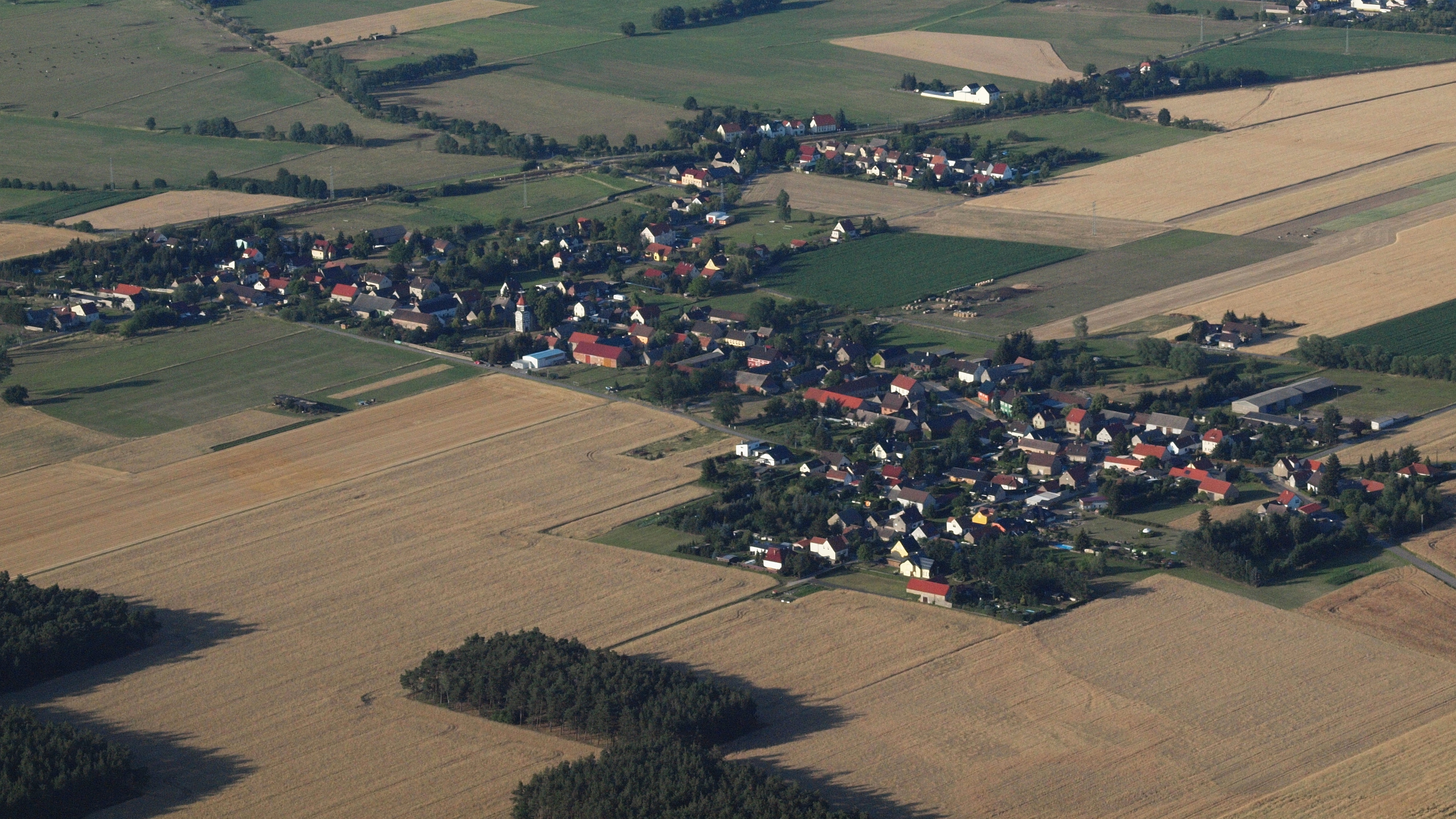 Kölsa, Luftaufnahme (2015)